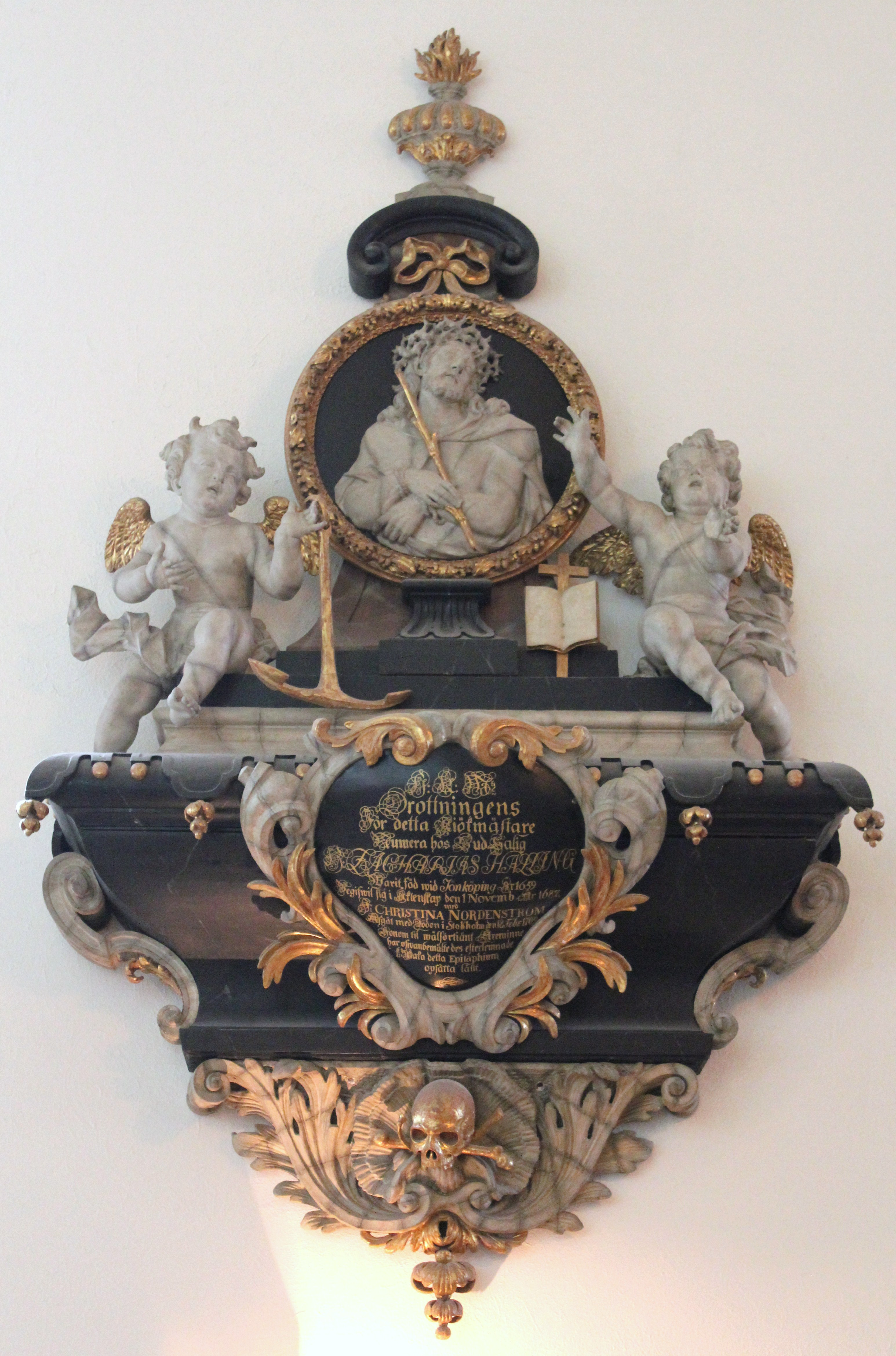 Kungsholms kyrka. Zacharias Hallings epitafium. Epitafium över Zacharias Halling (1731-1795) utfört av hovbildhuggaren Caspar Schröder (1652-1710), som även utfört dopkapellet i kyrkan.